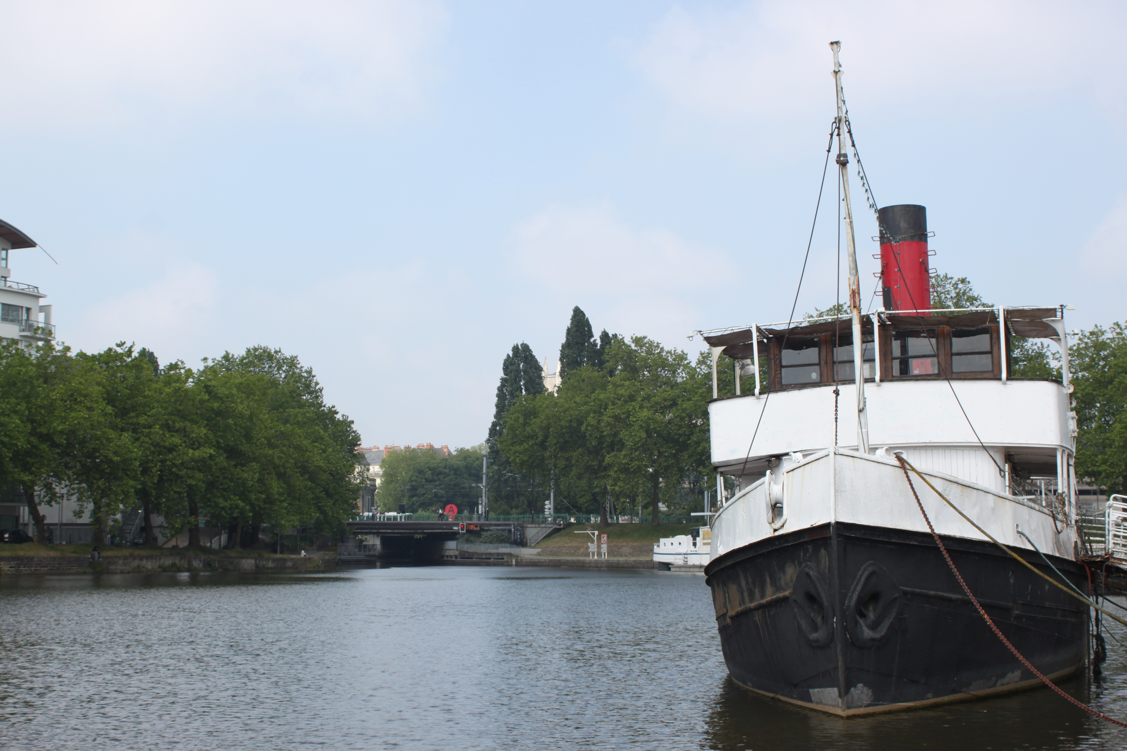 Port du canal Saint-Félix, Fr-44-Nantes.Au fond, l'entrée du tunnel.